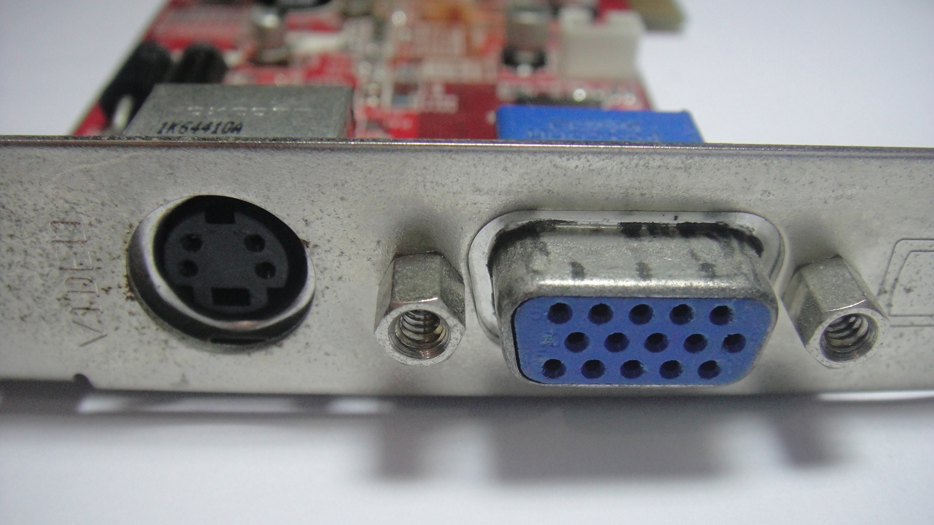 Solda S-Video ve sağda VGA(dişi) portu